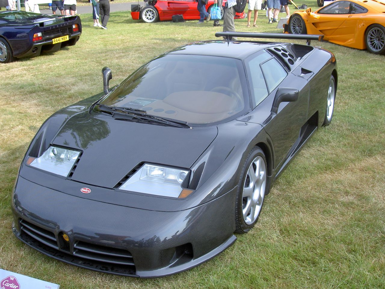 Dauer Bugatti EB110